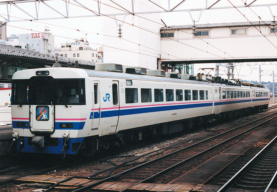 JR西日本 485系特急形電車 特急「スーパー雷鳥」